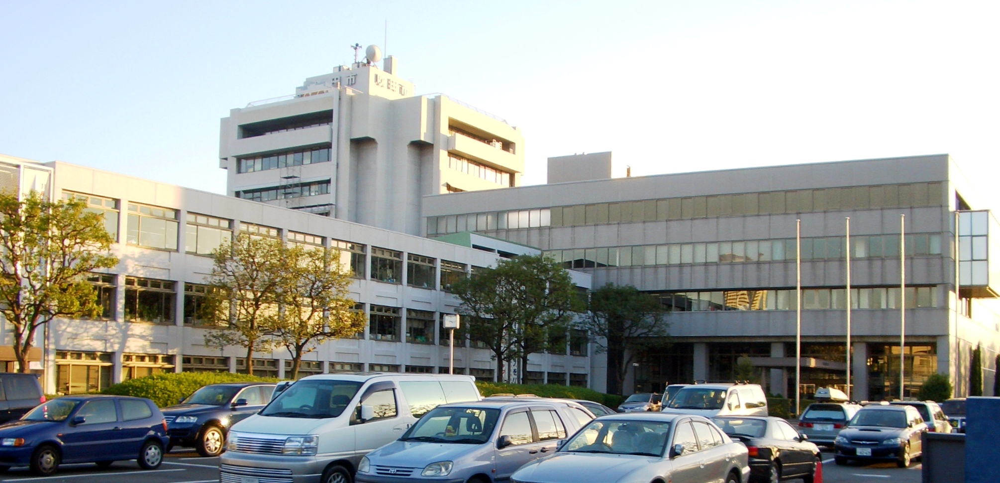 Suita City hall in Osaka, Japan. 吹田市役所